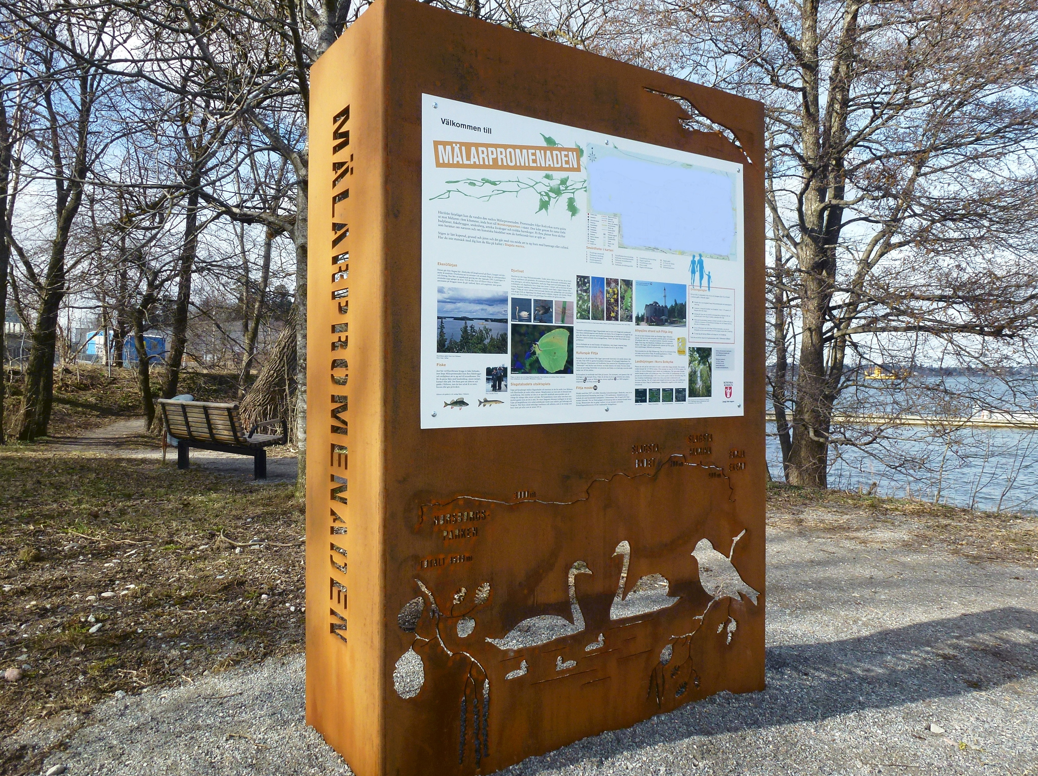 Mälarpromenaden infoskylt